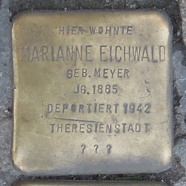 Stolperstein in Soest Brüderstraße 36, Marianne Eichwald